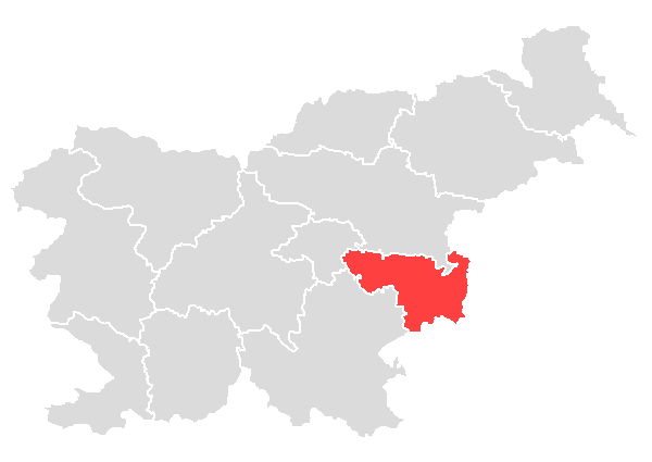 SURS